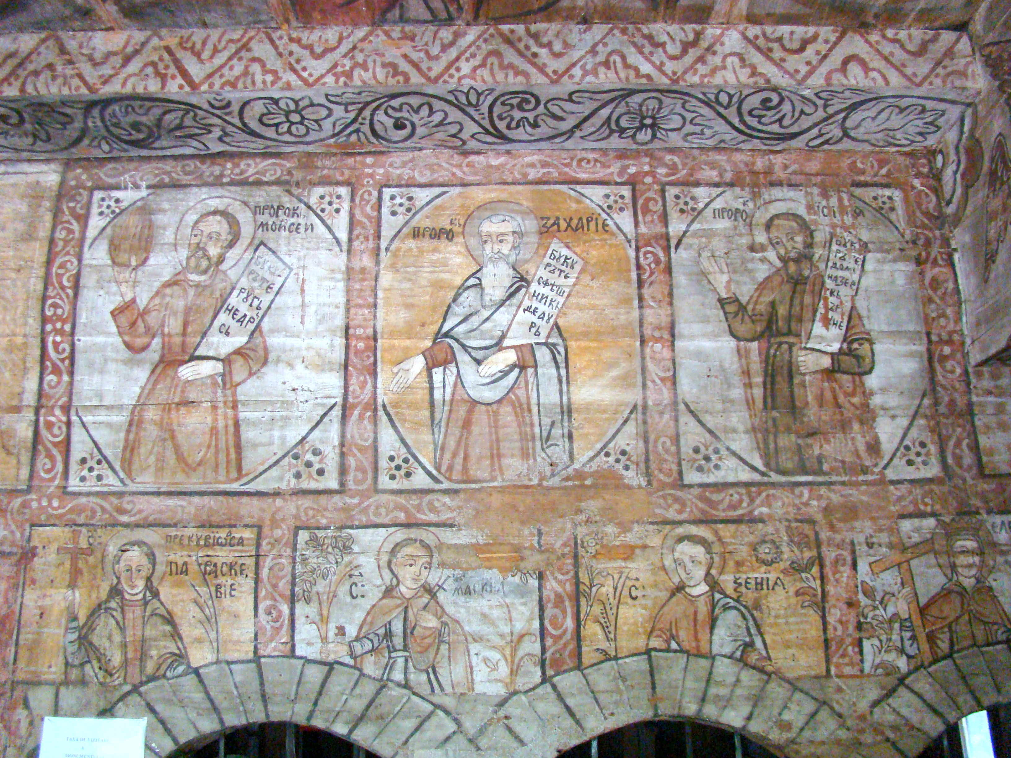 Biserica de lemn "Naşterea Maicii Domnului", sat IEUD